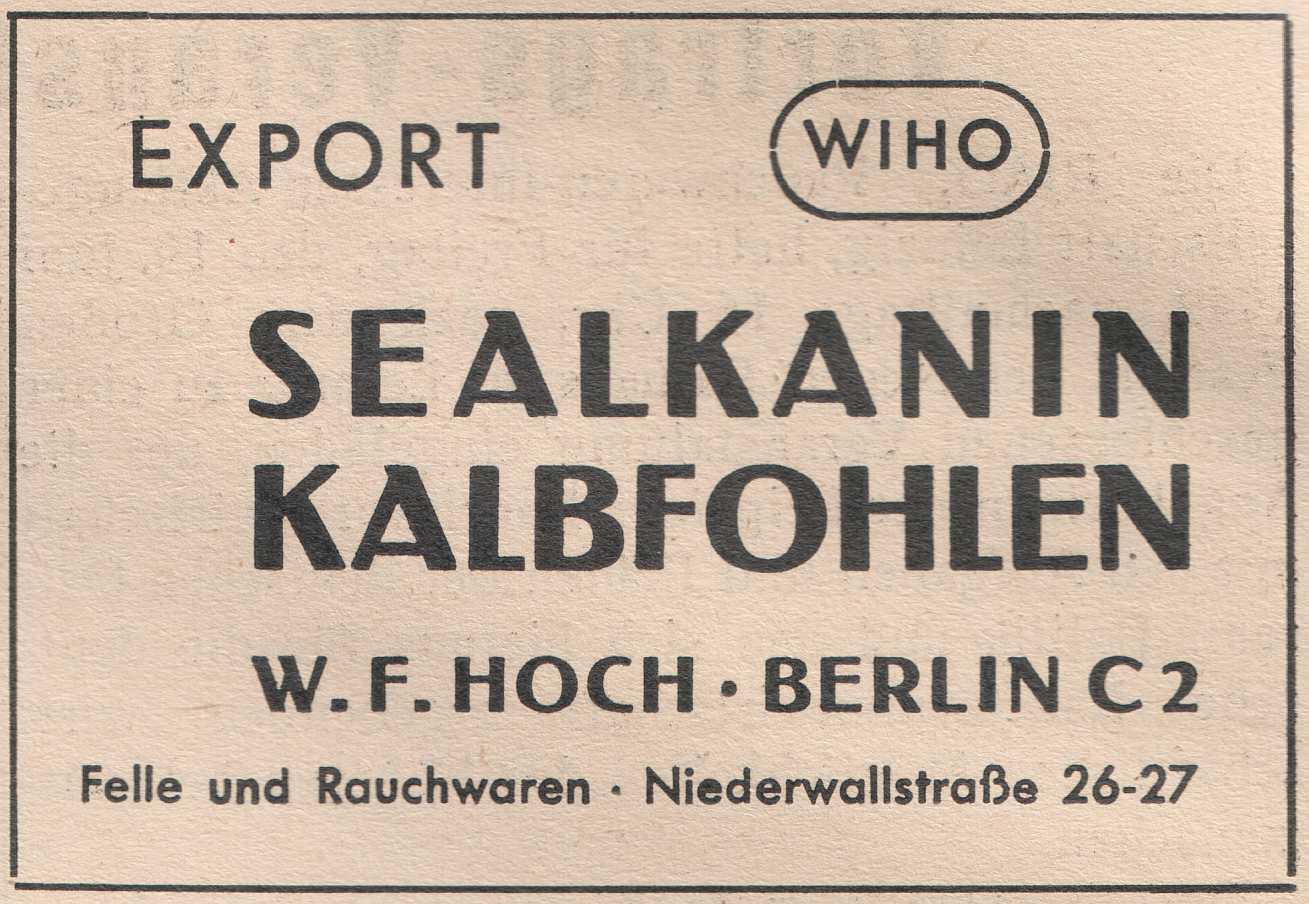 WIHO - W. H. Hoch, Berlin C 2, Niederwallstraße 26-27. Anzeige in einer Rauchwarenzeitung im Jahr 1942. Export. Sealkanin, Kalbfohlen Anm.: Sealkanin sind geschorene, schwarz gefäbte Kaninchenfelle, Kalbfohlen ist die heute nicht mehr zulässige Bezeichnung für fohlenfellähnliche Kalbfelle (analog anderen Fellbezeichnungen wäre Fohlenkalb richtig, was aber in diesem Fall ebenfalls irreführend wäre, da es auch ein Fohlen, ein junges Pferd, bezeichnen könnte).